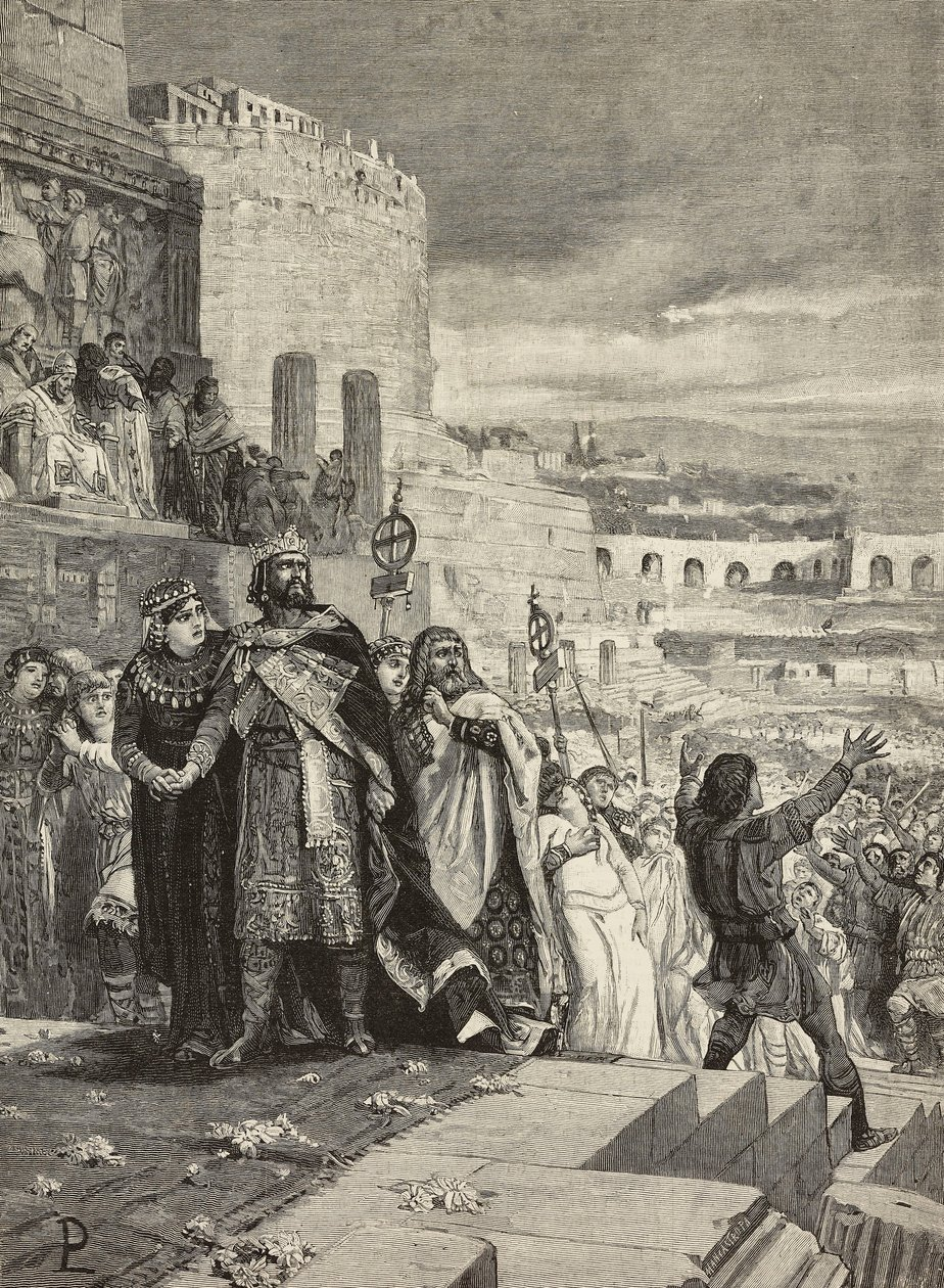 Boda de Marozia con Hugo de Arlés. Wedding of Marozia. Incisione da F Bertolini La Storiua di Roma Le Nozze di Marozia e Ugo di provenza